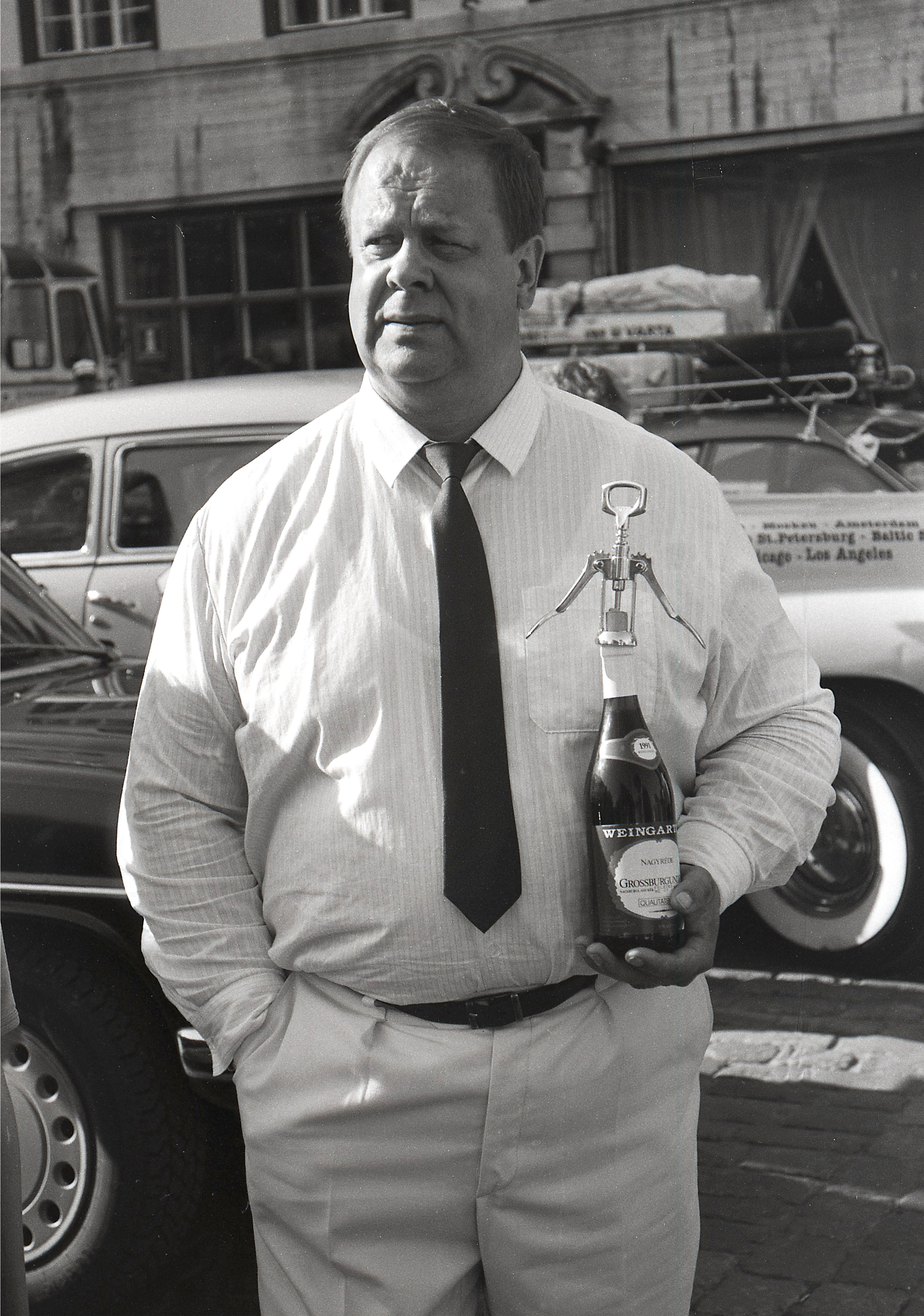 Mati Nuude 1992. aastal